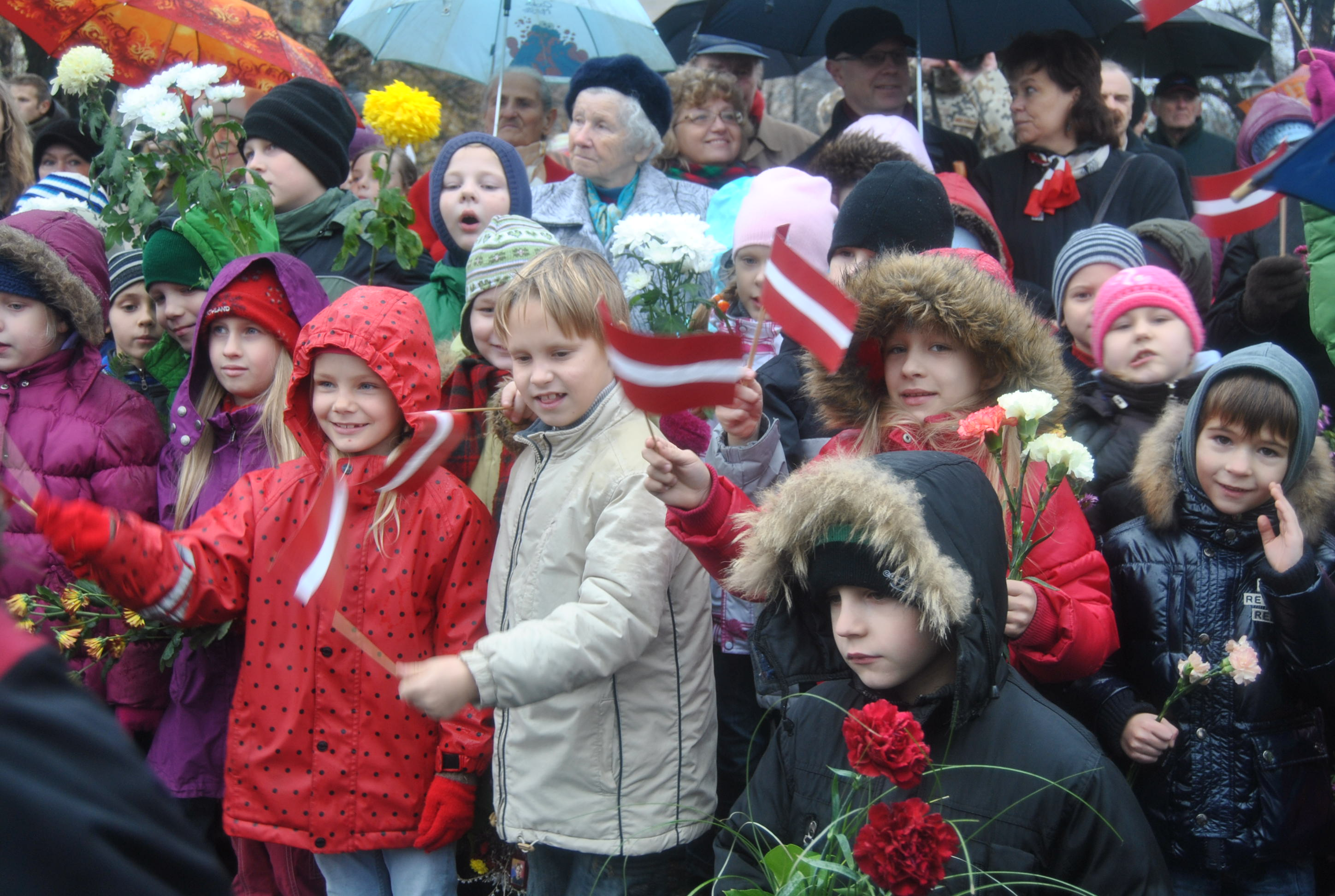 2010.gada 11.novembris. Pie Brīvības pieminekļa tiek nolikti ziedi un notiek Nacionālo bruņoto spēku Rīgas Garnizona vienību militārā parāde. Foto: Saeima